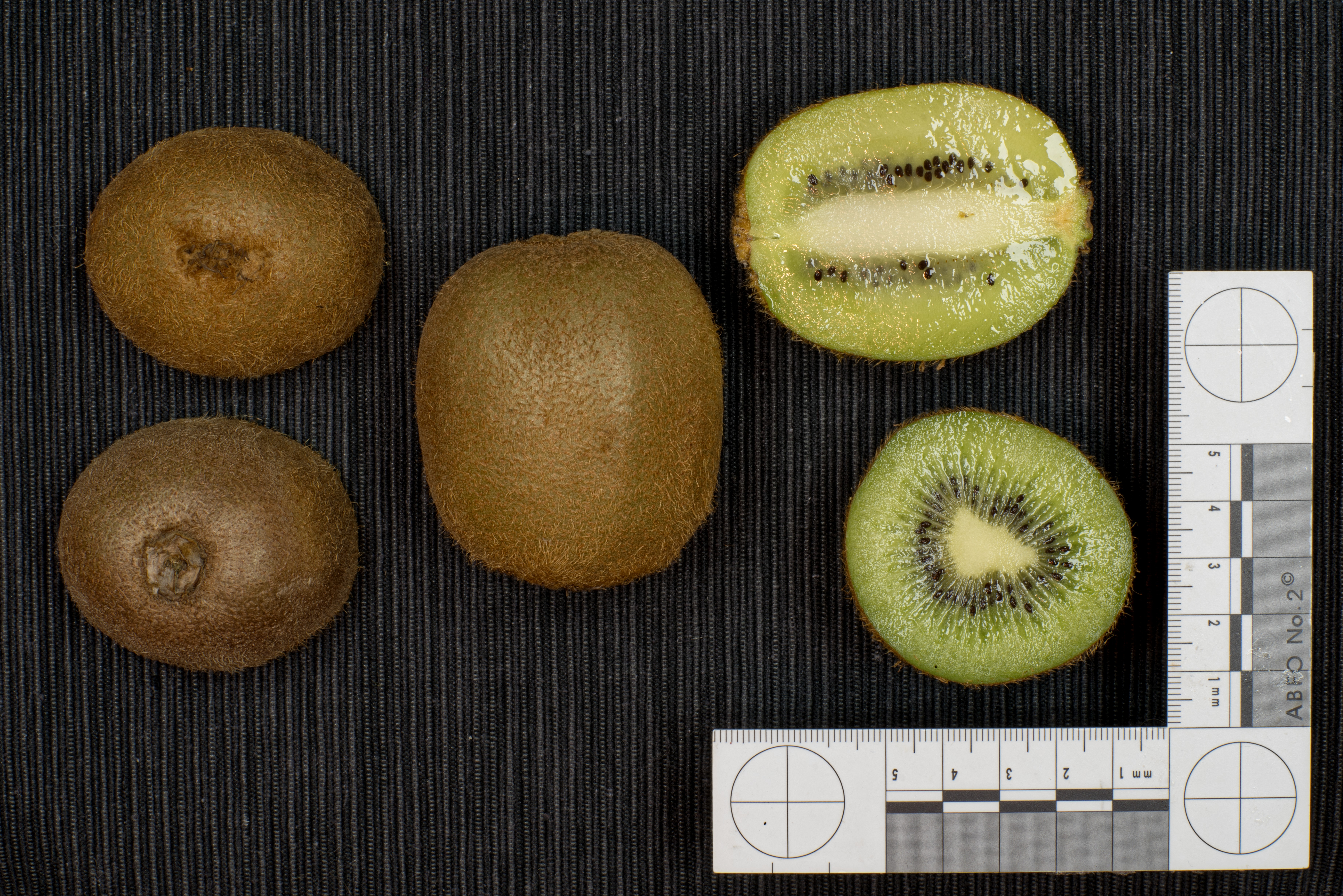 Obst: Kiwi